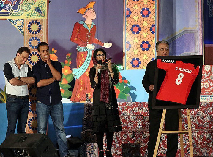 علی کریمی با حضور در مـوسسه خیریه سالمندان فیاض‌بخش مشهد، پیراهن خود در تیم پرسپولیس را جهت کمک به این موسسه به حراج گذاشت.